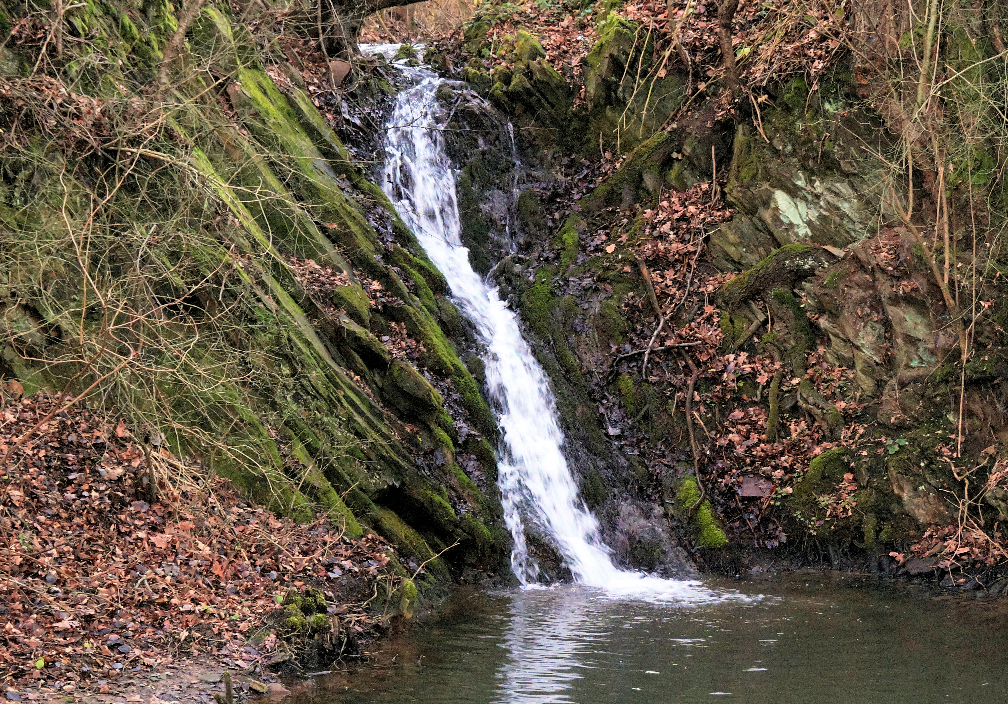 Schmida, Wasserfall - Dez.2015